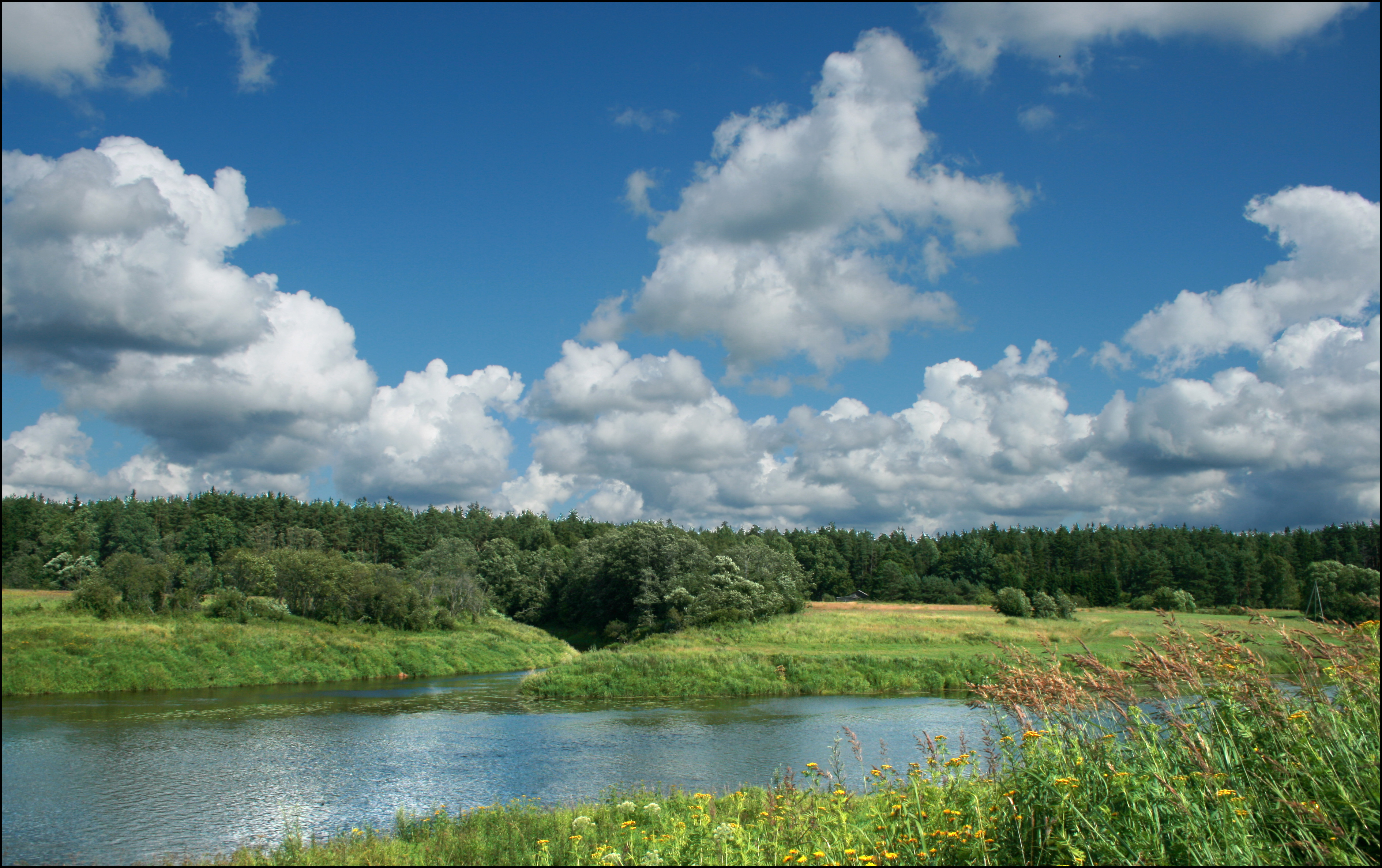 Abavas senlejas dabas parks